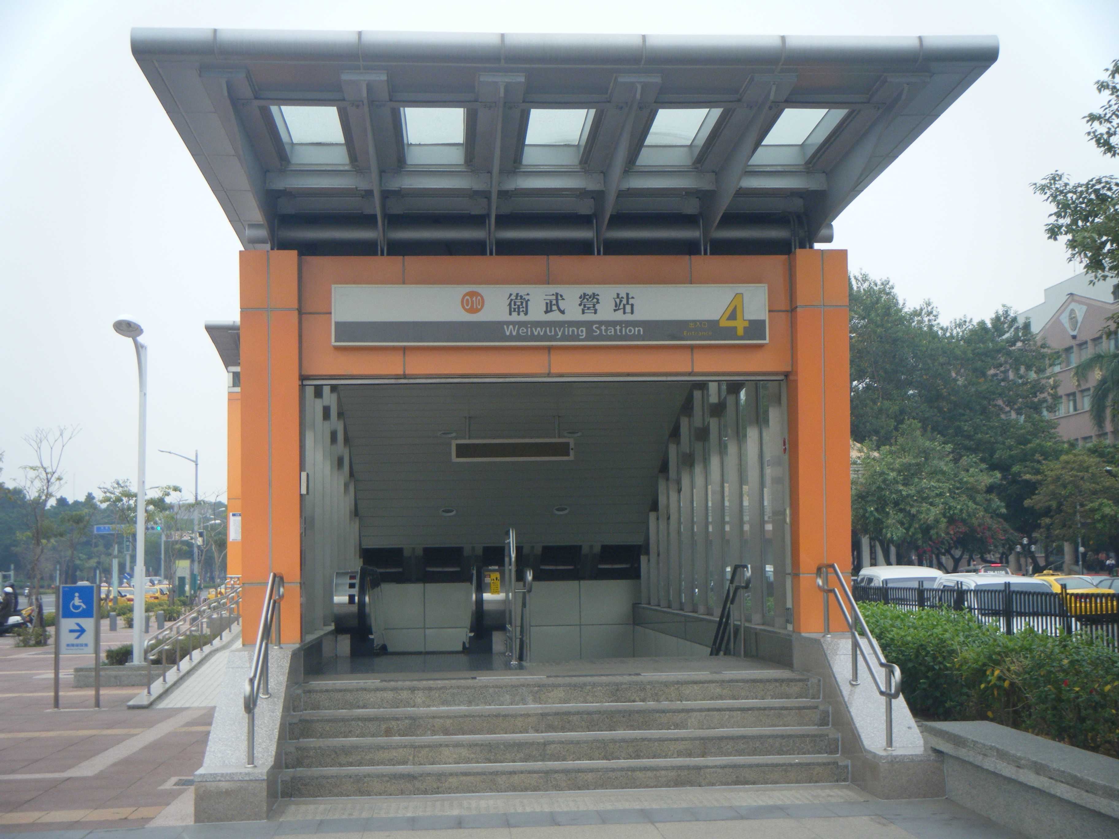 捷運衛武營站